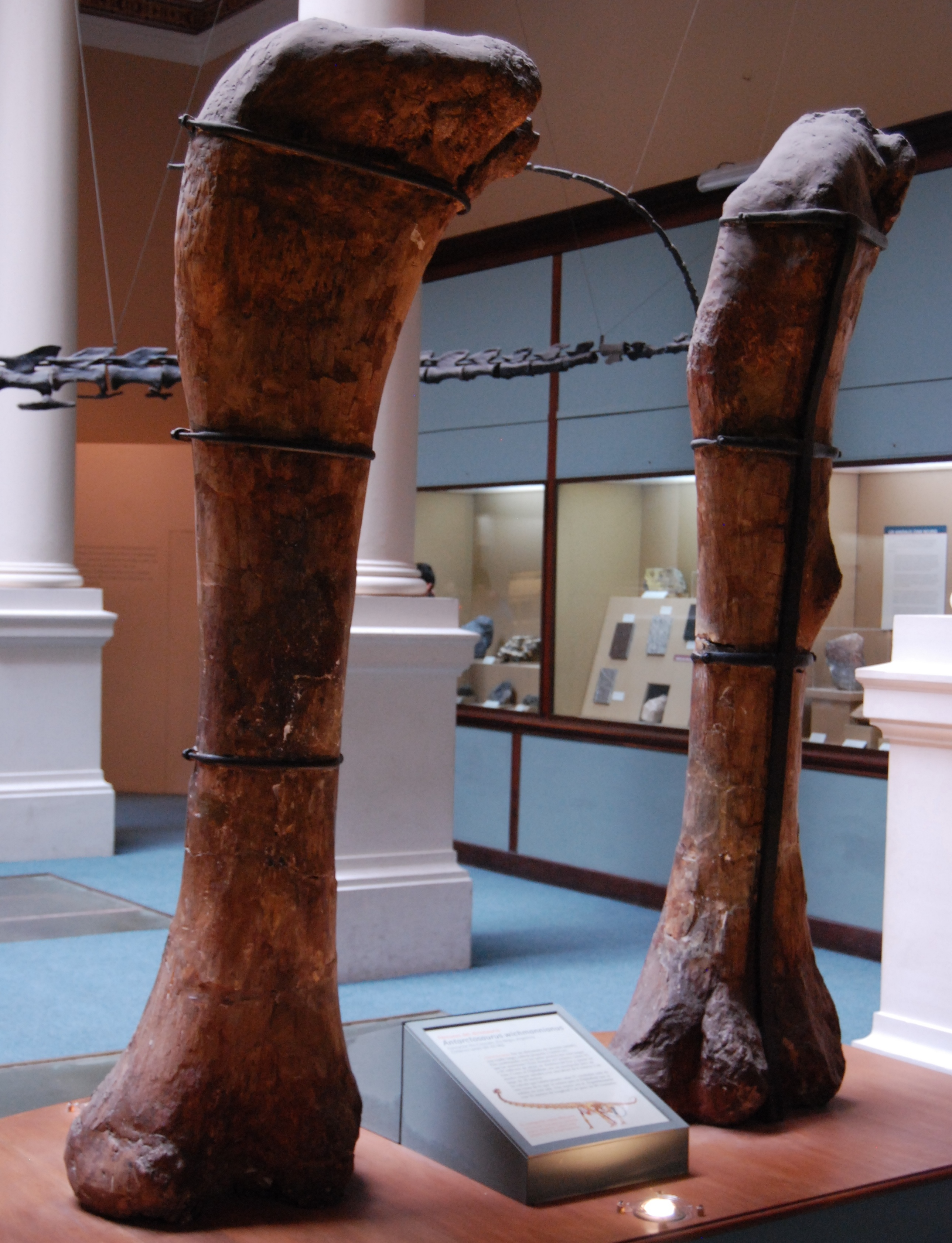 Fémures del dinosaurio Antarctosaurus giganteus. Formación Río Colorado, Río Negro, Argentina, Cretácico tardío (83-65 Ma)